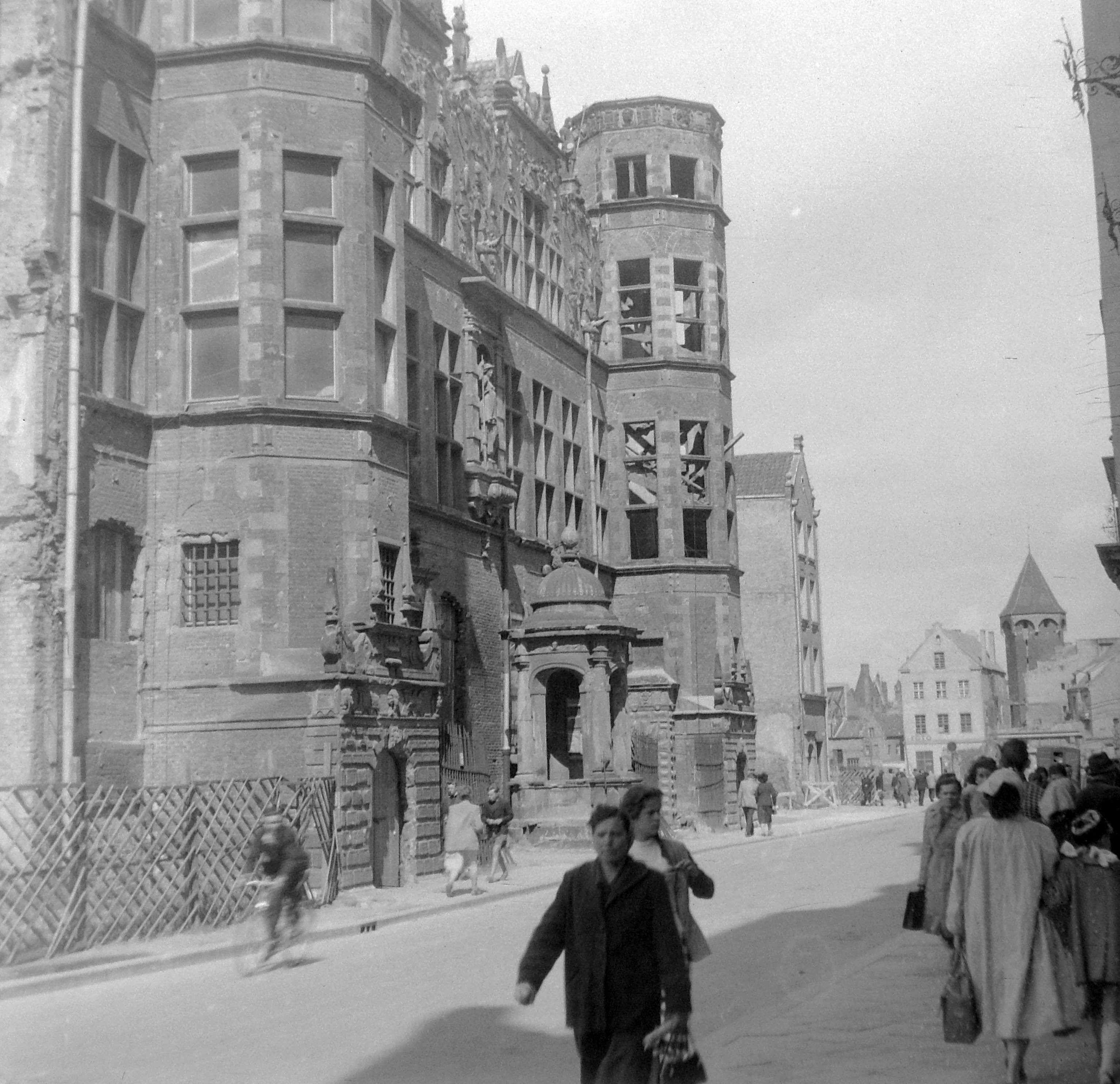 ulica Kolodziejska, balra a Wielka Zbrojovna (Grosses Zeughaus, Nagy Fegyverraktár), háttérben a Jacek bástya. Location: Poland, Gdansk Tags: damaged building Title: ulica Kolodziejska, balra a Wielka Zbrojovna (Grosses Zeughaus, Nagy Fegyverraktár), háttérben a Jacek bástya.